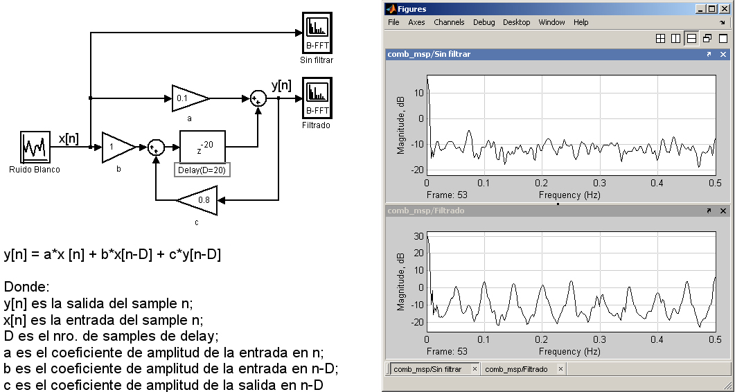 Ejemplo (diagrama y análisis espectral) de una la implementación digital de un filtro comb aplicado a ruido blanco.